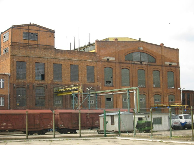 Cukrownia w Zdunach